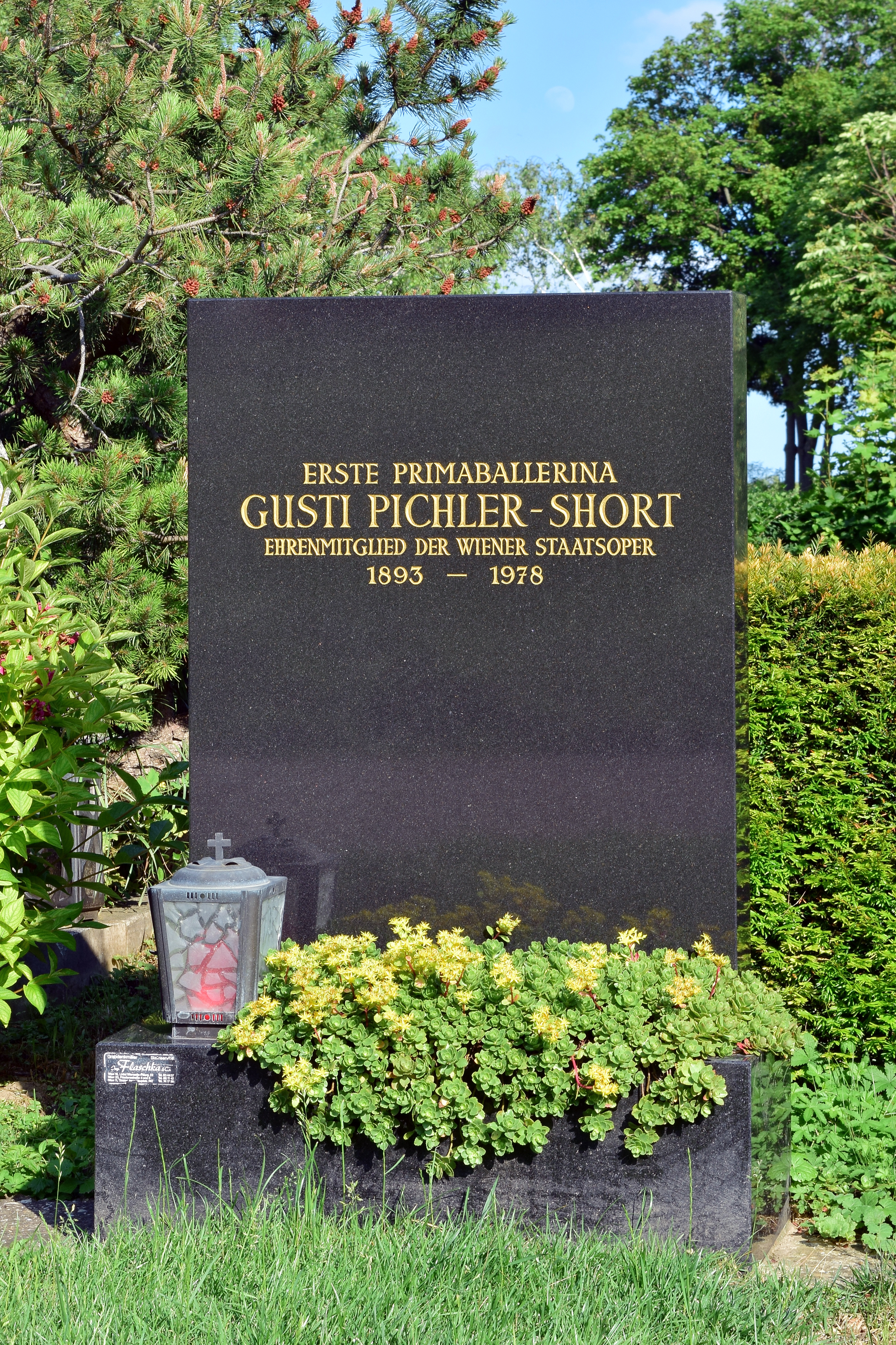 Ehrenhalber gewidmetes Grab von Gusti Pichler auf dem Wiener Zentralfriedhof, Gruppe 40.